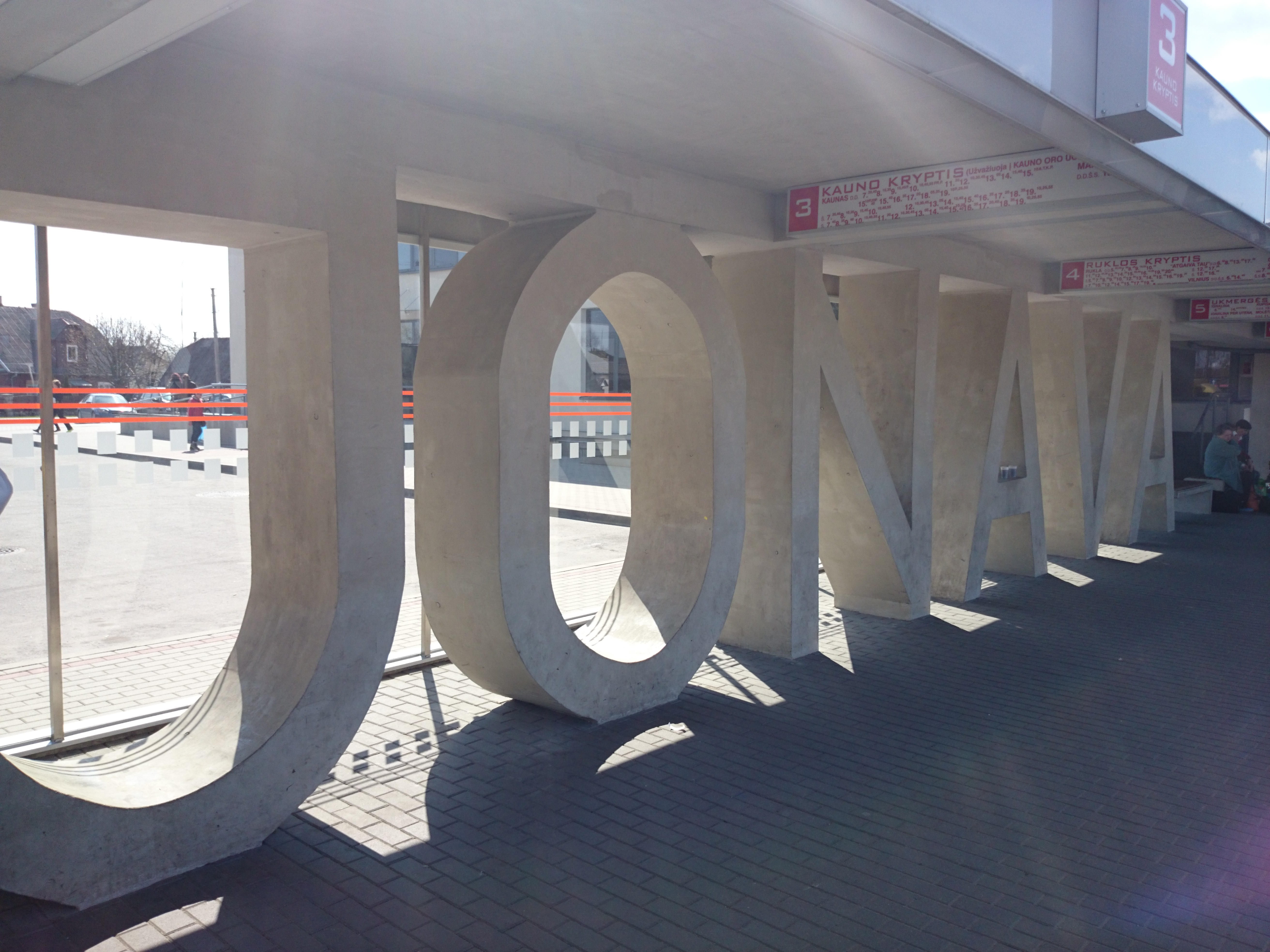 Jonava bus station